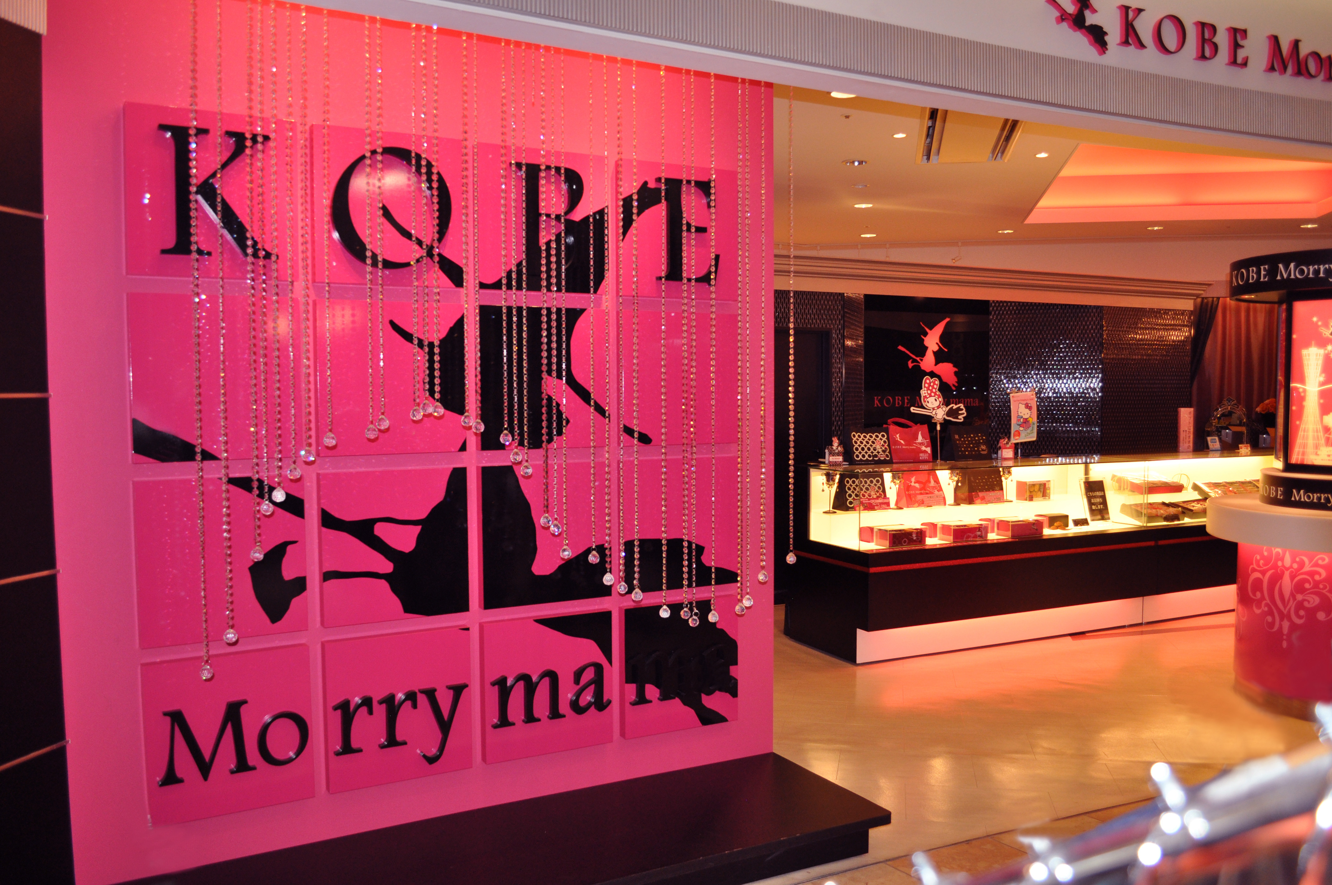 kobemorrymama-神戸モリ―ママハーバーランド店